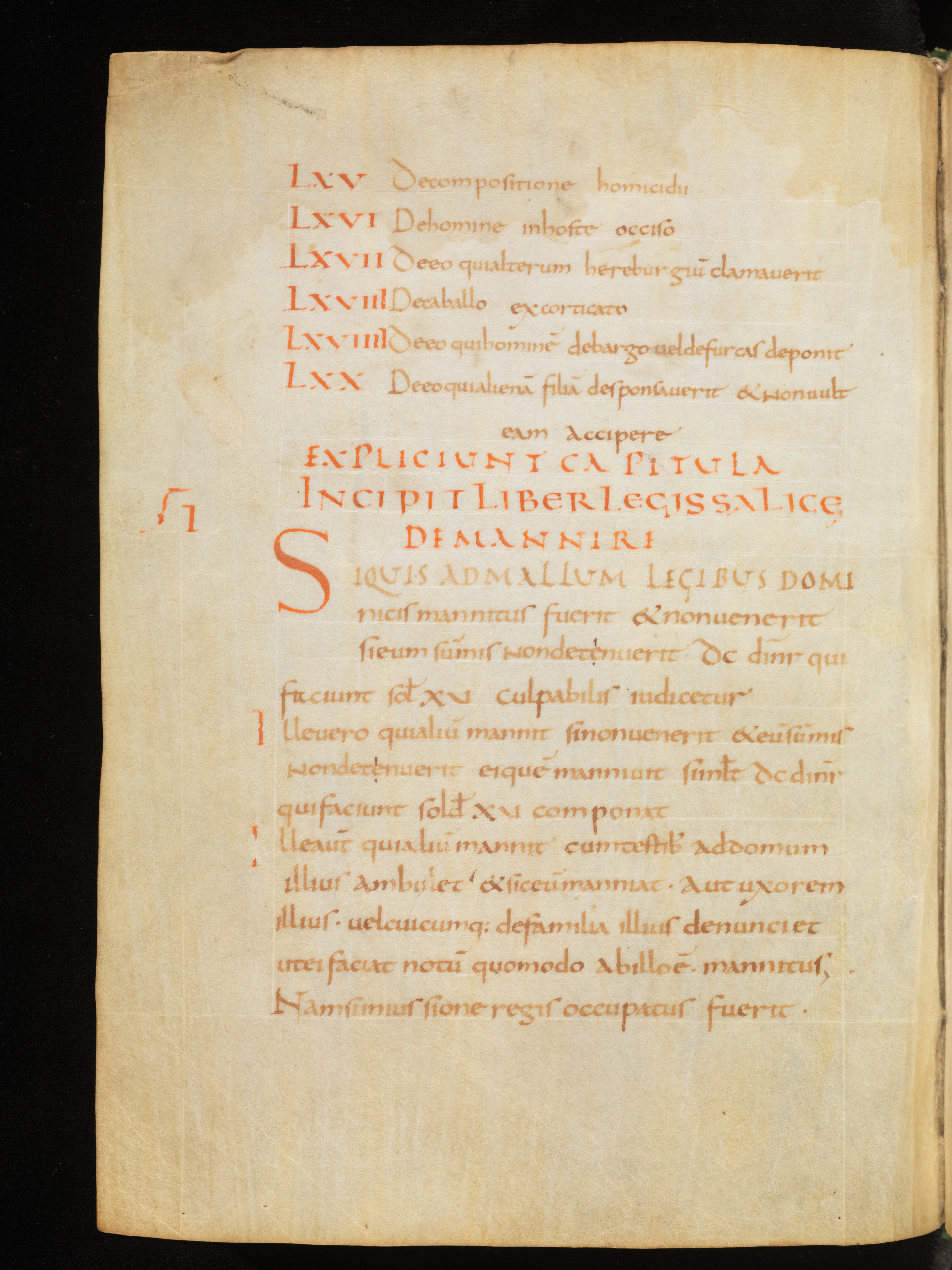 Lex Salica (Karolina emendata)